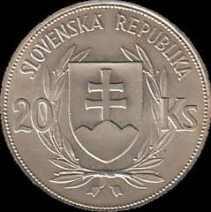 20 Slovak korún coin from 1939 - obverse